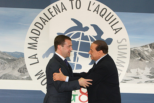 ИТАЛИЯ, АКВИЛА. Перед началом саммита «Группы восьми». С Председателем Совета министров Италии Сильвио Берлускони.